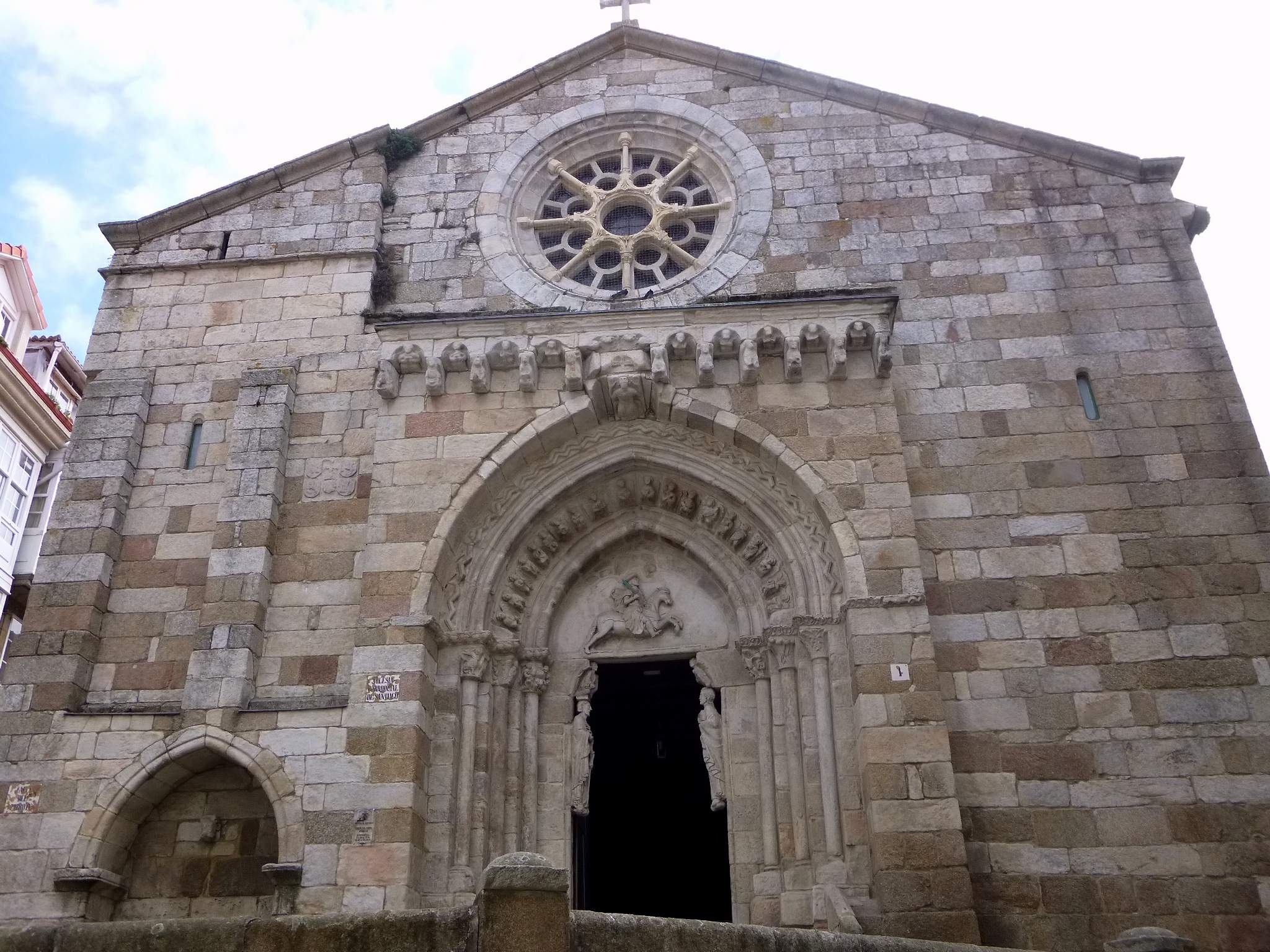 A Coruña - Iglesia de Santiago